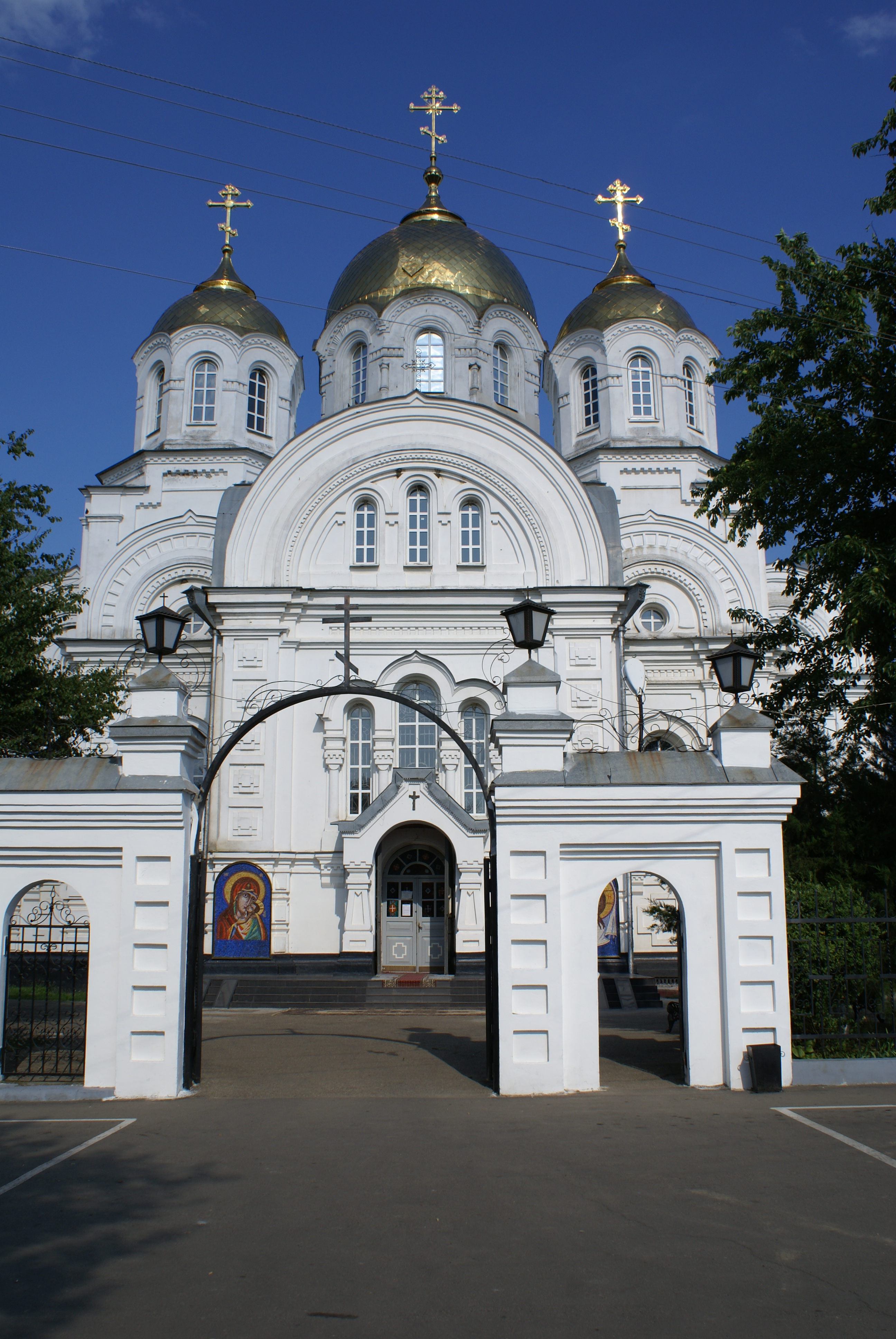 Вознесенская церковь (Краснодарский край, Кореновск, станица пластуновская, центр)